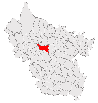 Categorie:Hărţi ale judeţului Buzău